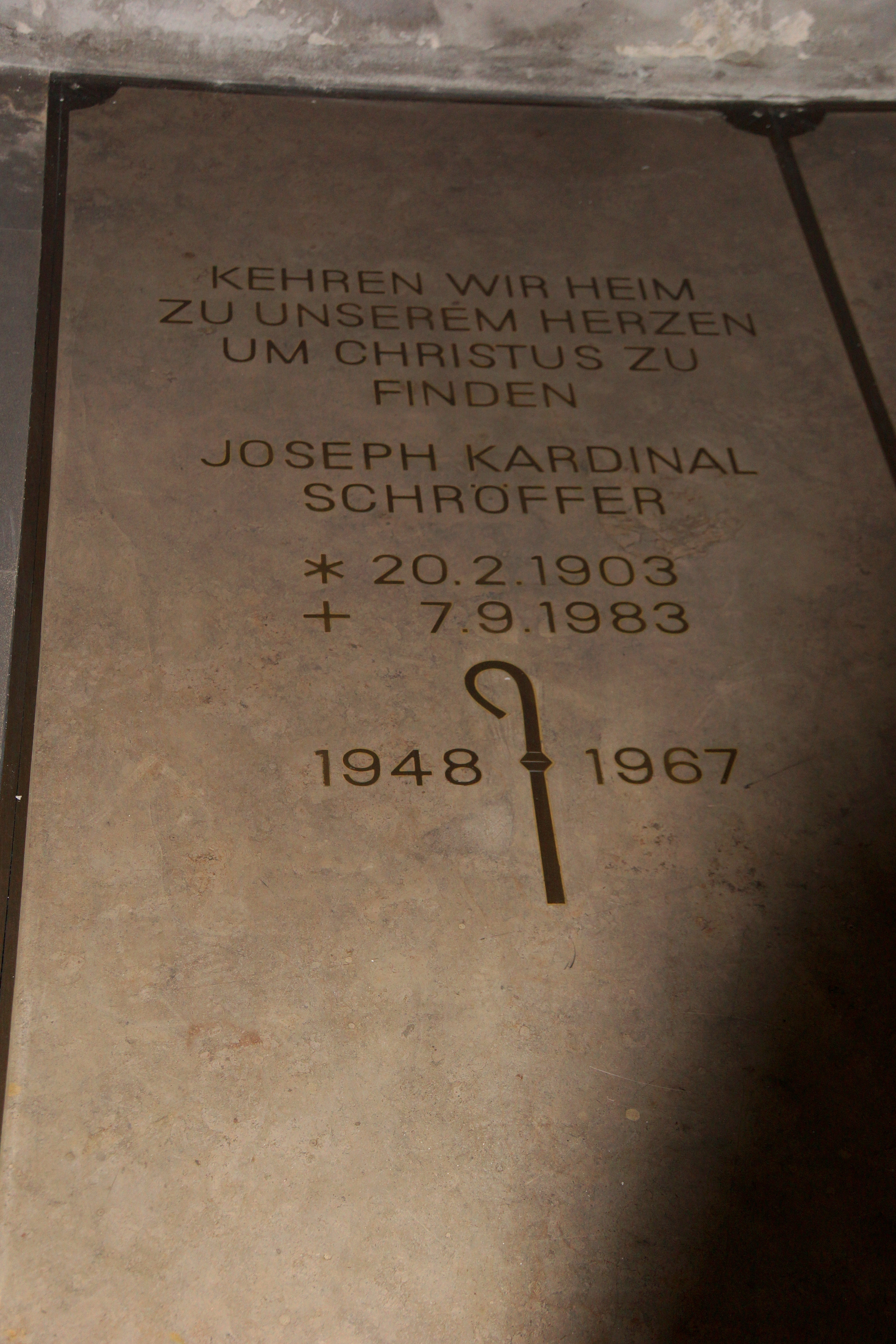 Der Willibaldsdom zu Eichstätt